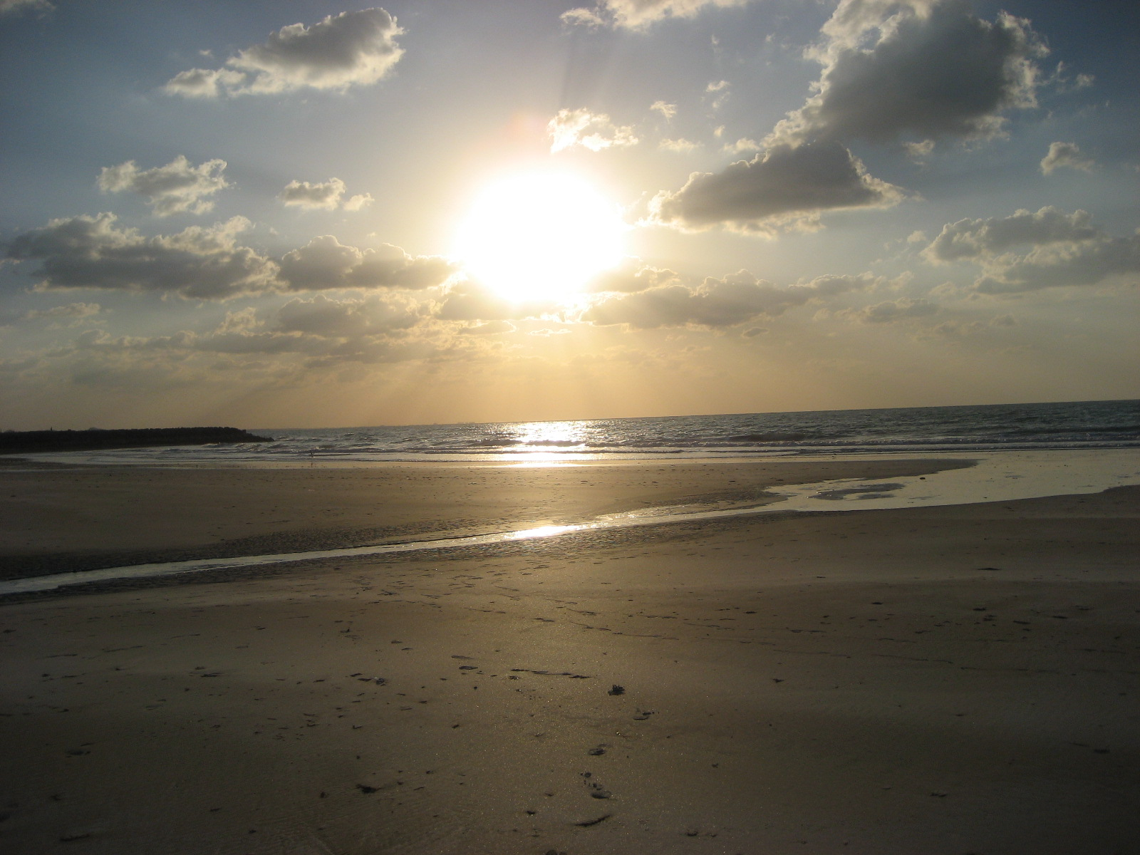 Sea at Ras al-Kaimah, UAE